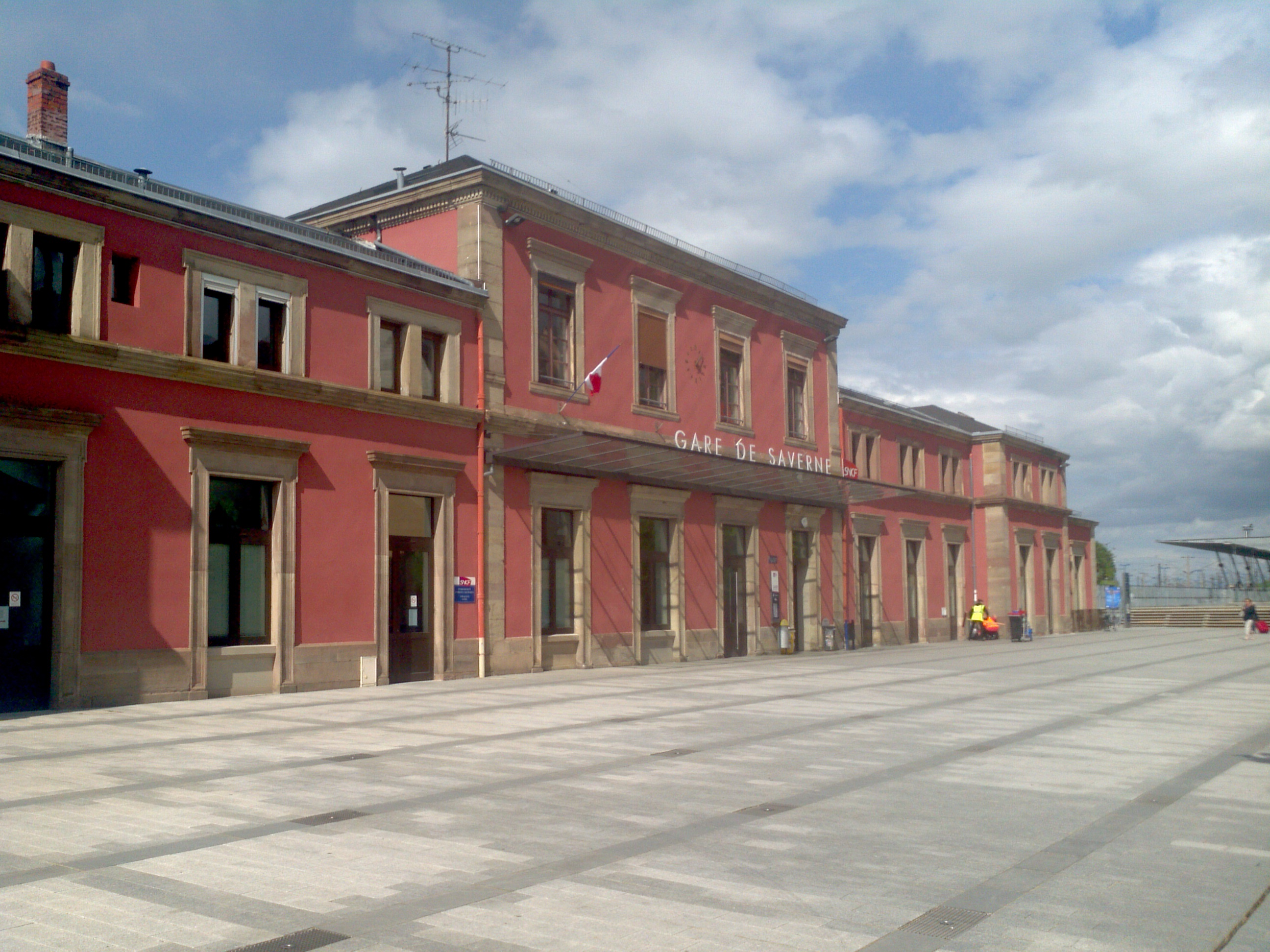 Gare de Saverne